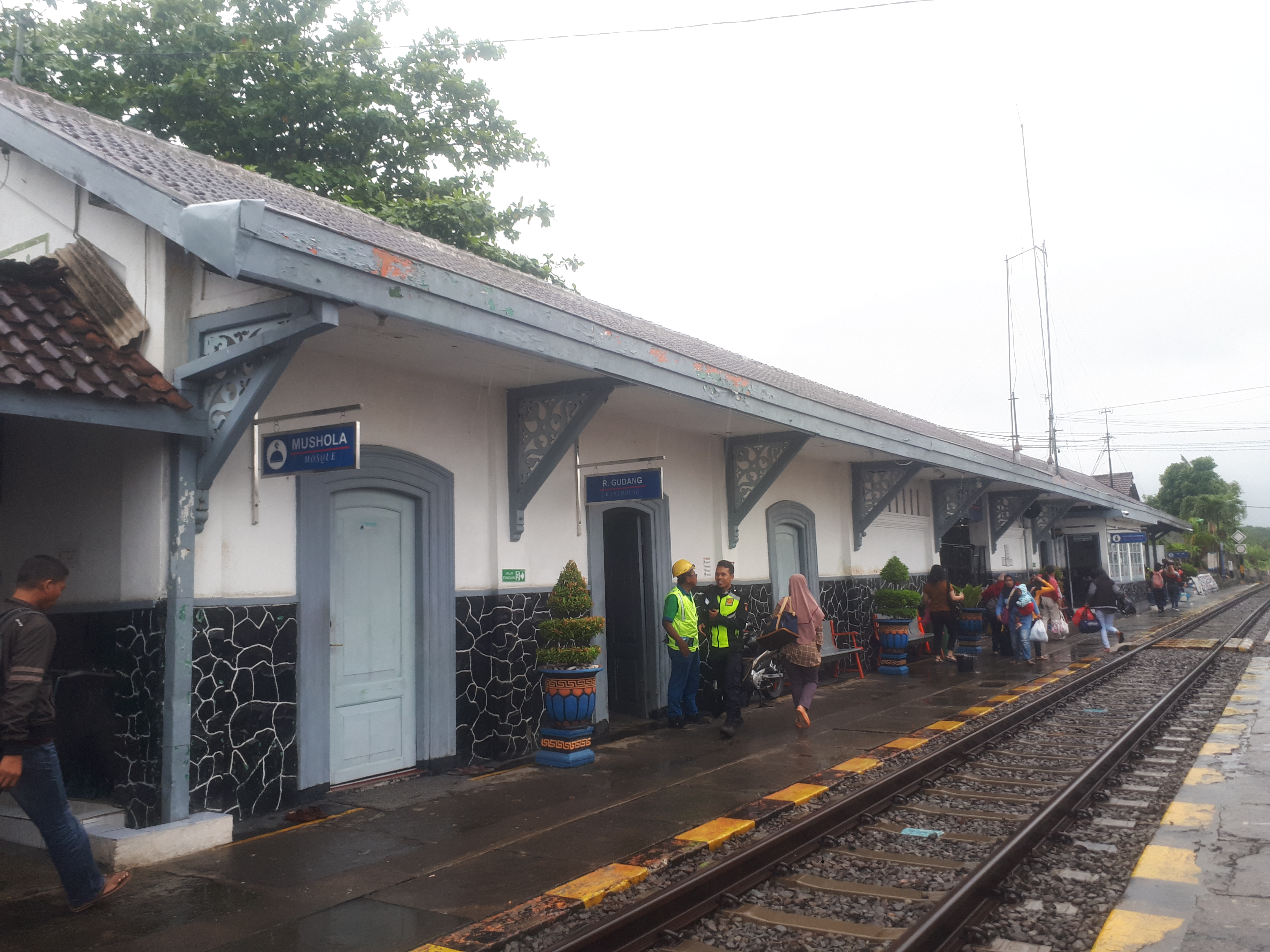 Stasiun Wlingi pada tahun 2020